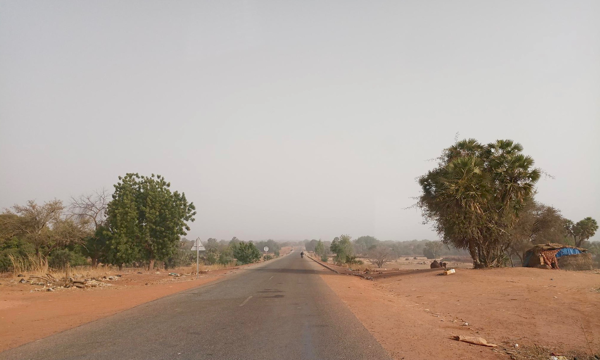 Nationalstraße 27 im Tamou-Wildreservat, Gemeinde Tamou, Niger.